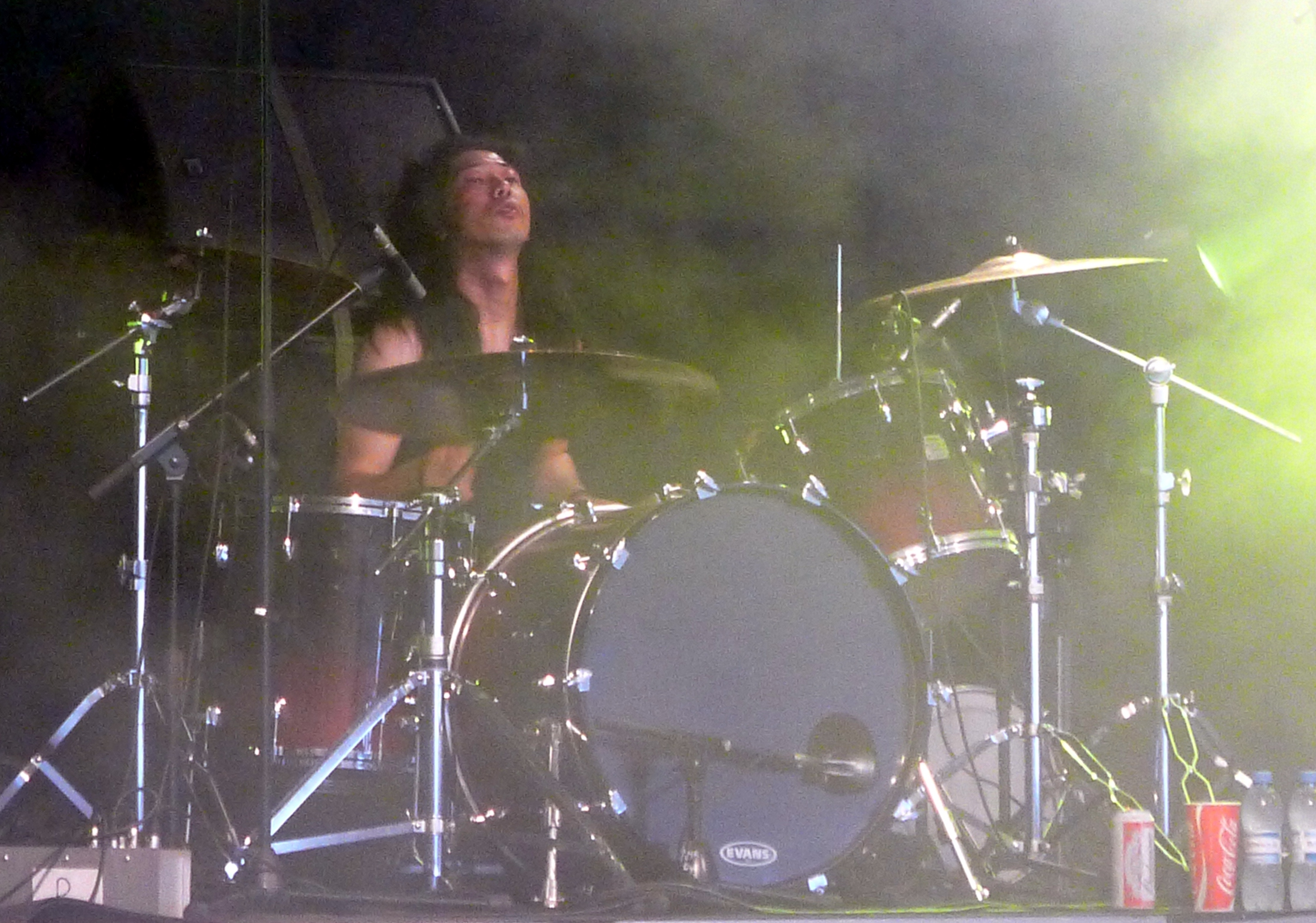 Church of Misery live am Tuska Open Air 2011